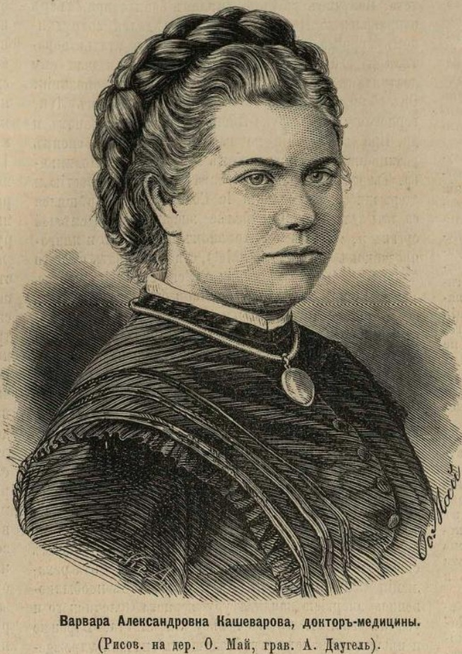 Варвара Александровна Руднева-Кашеварова (урождённая — Нафанова) (1841—1899) — первая российская женщина — доктор медицины.